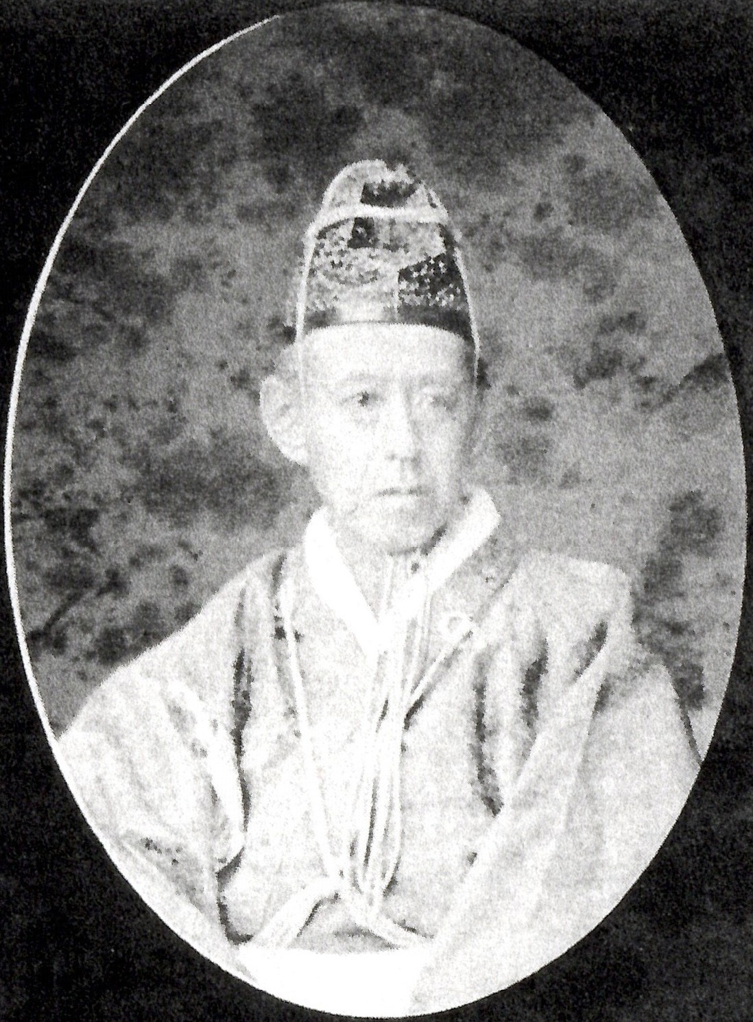 諏訪忠誠の肖像写真。